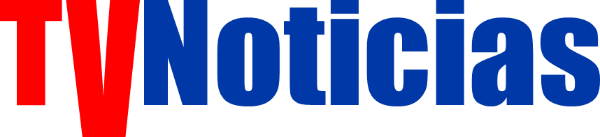 Logotipo de TVNoticias, utilizado desde 1995 hasta 2012. Aun sigue siendo utilizado en parte de la publicidad del canal.